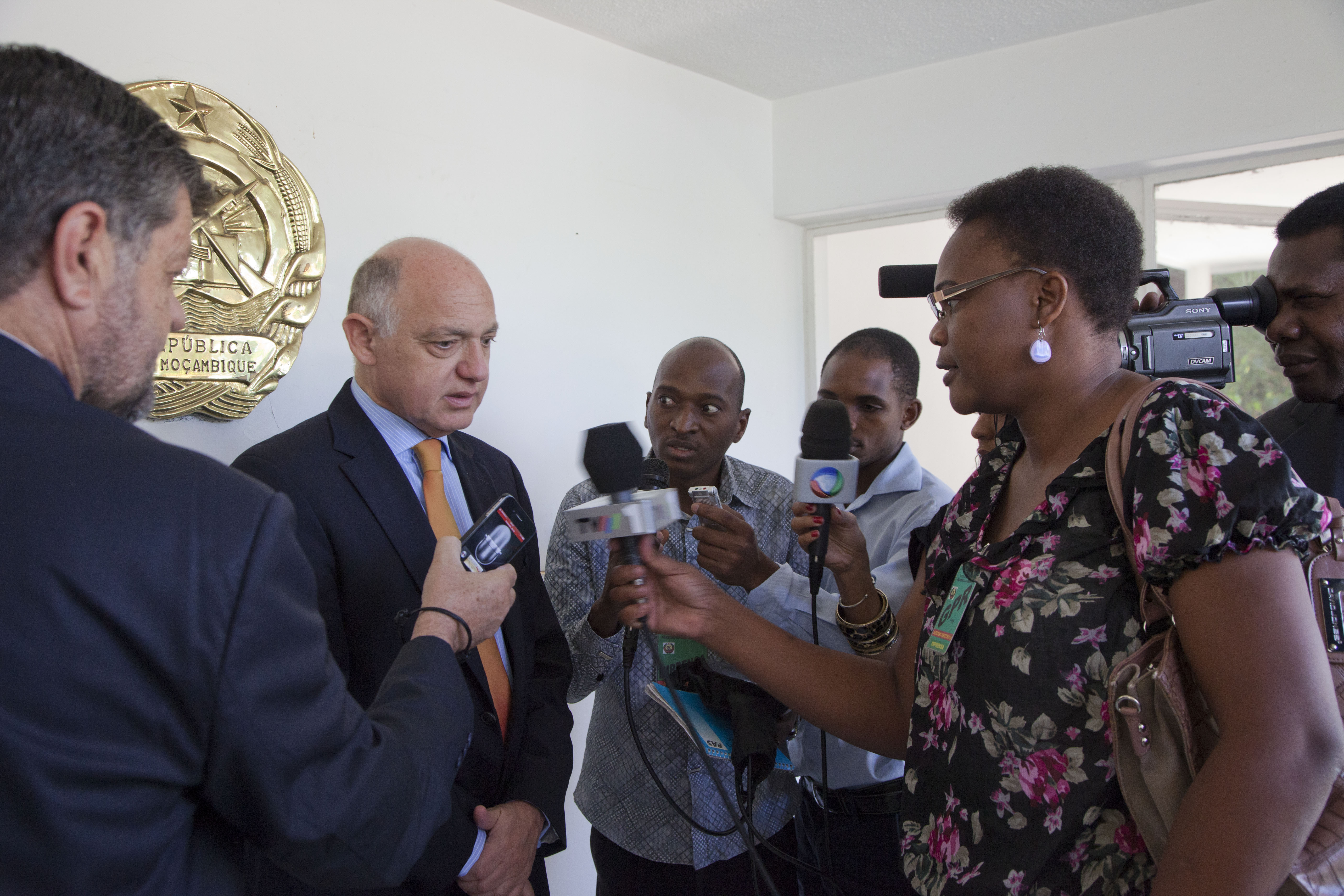 Mozambique, Maputo. Marzo 9 de 2012. El canciller argentino Héctor Timerman fue recibido por el presidente de esa República Africana, Armando Emilio Guebuza. Posteriormente mantuvo un encuentro con la prensa local